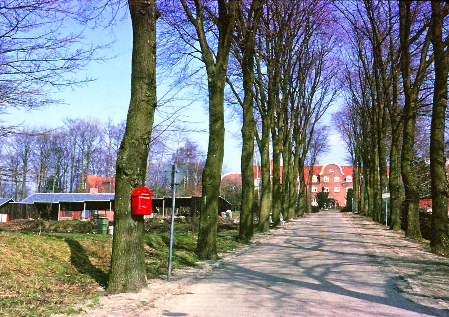 Billedet er taget af Allé'en op til Roskilde Højskole i 1966.